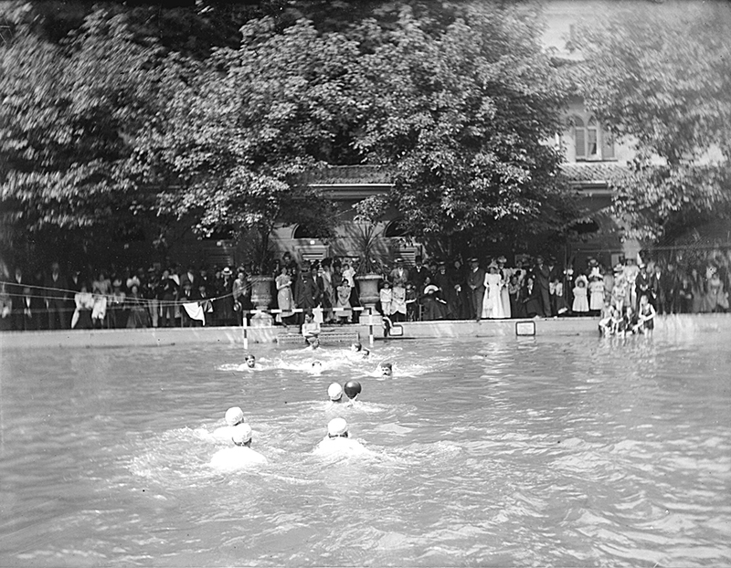 Pallanuoto nel Bagno Diana, ca. 1900, foto Leone Soldati, gelatina ai Sali d’argento su lastra stereoscopica, 4,5×10,7 cm. Archivio Soldati, Milano.